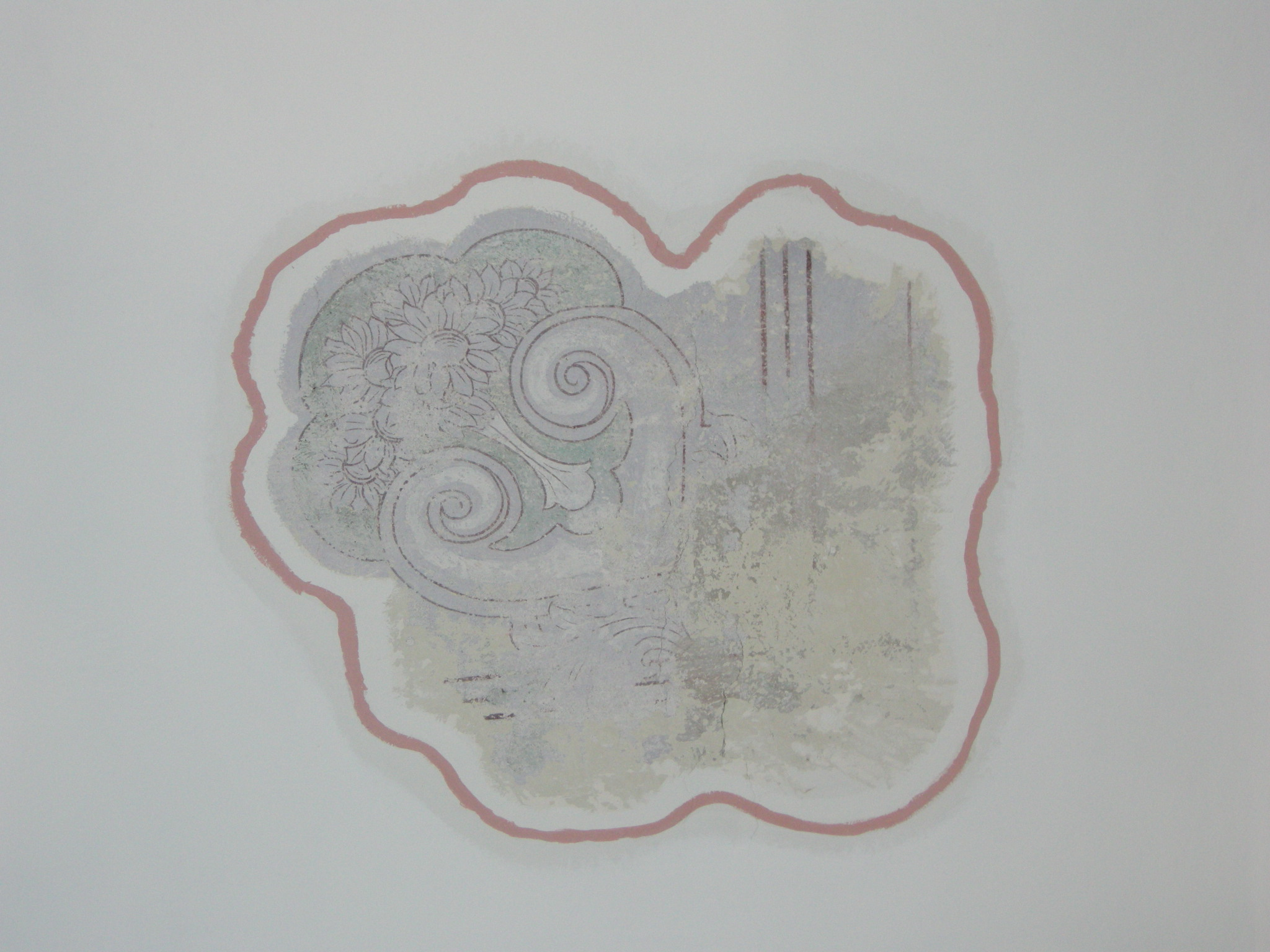 Hotel italia, marina di massa, tracce di affreschi